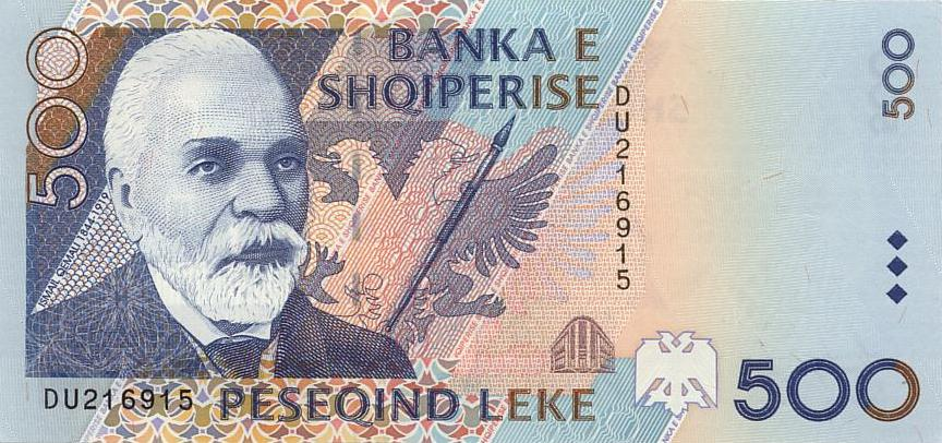 500 Albanian lek